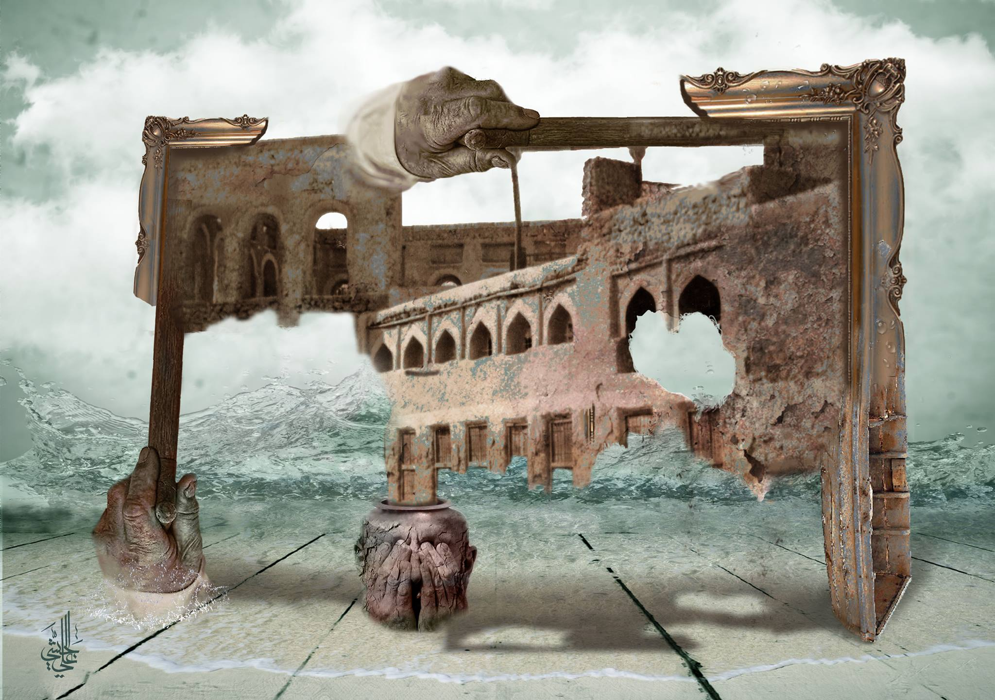 لوحة فنيّة للفنان القطيفي علي الجشي، دمج فيها عدّة صور من ضمنها منازل قلعة القطيف.